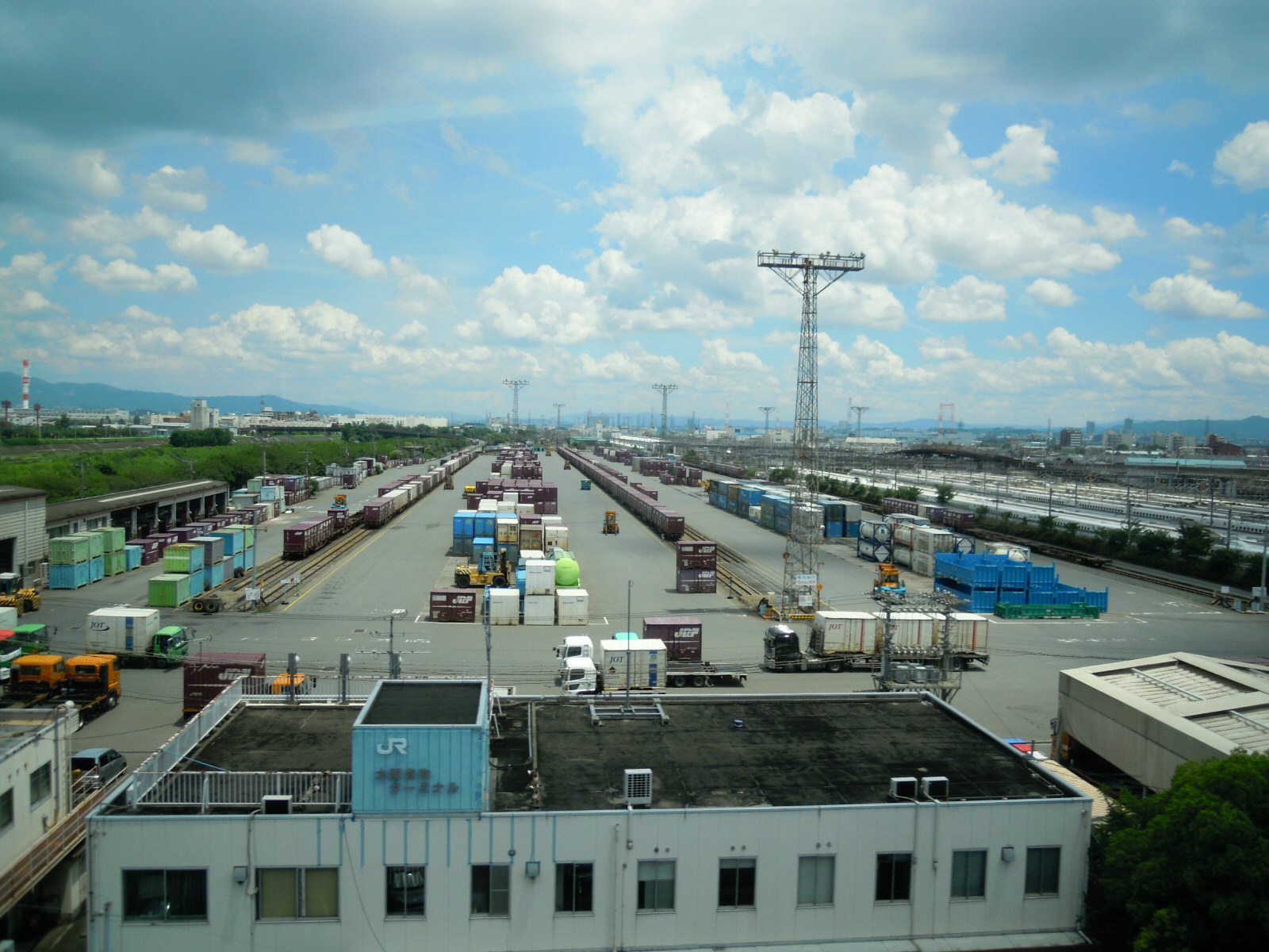 Torikai train base